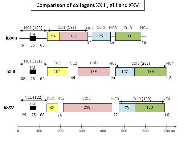 Comparación de los colágenos tipo XXIII, XIII y XXV